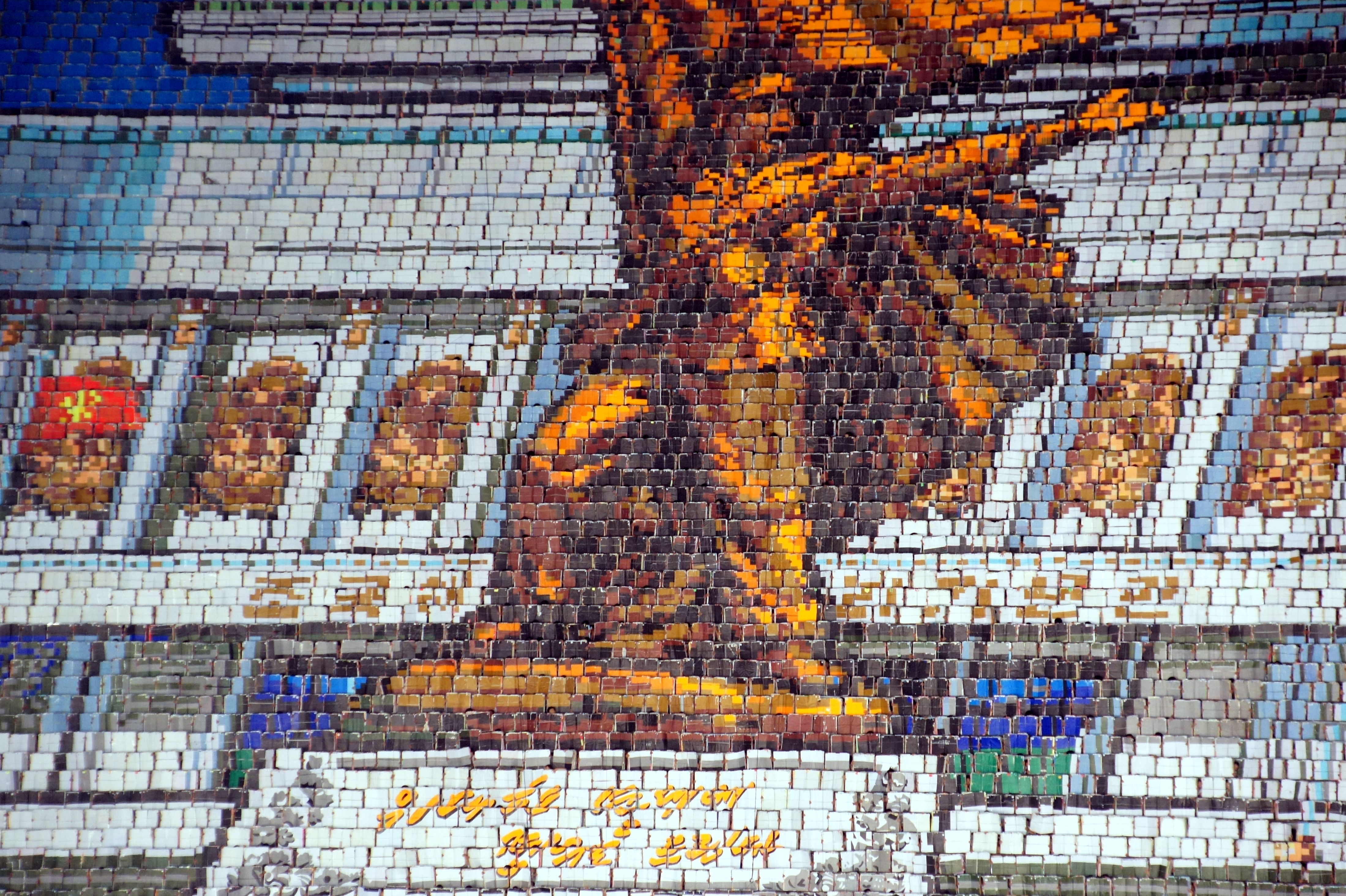 La Gimnasia de las Grandes Masas y Actuación Artística Arirang o simplemente Festival Arirang (chosŏn'gŭl: 아리랑 축제, hancha: 아리랑 祝祭, romanización revisada: Arirang Chukje, McCune-Reischauer: Arirang Ch'ukche)?, es un festival que se lleva a cabo en el Estadio Reungrado Primero de Mayo en Pionyang, Corea del Norte.